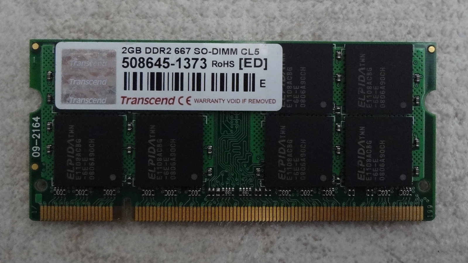 創見資訊2GB DDR2 667 SO-DIMM記憶體模組